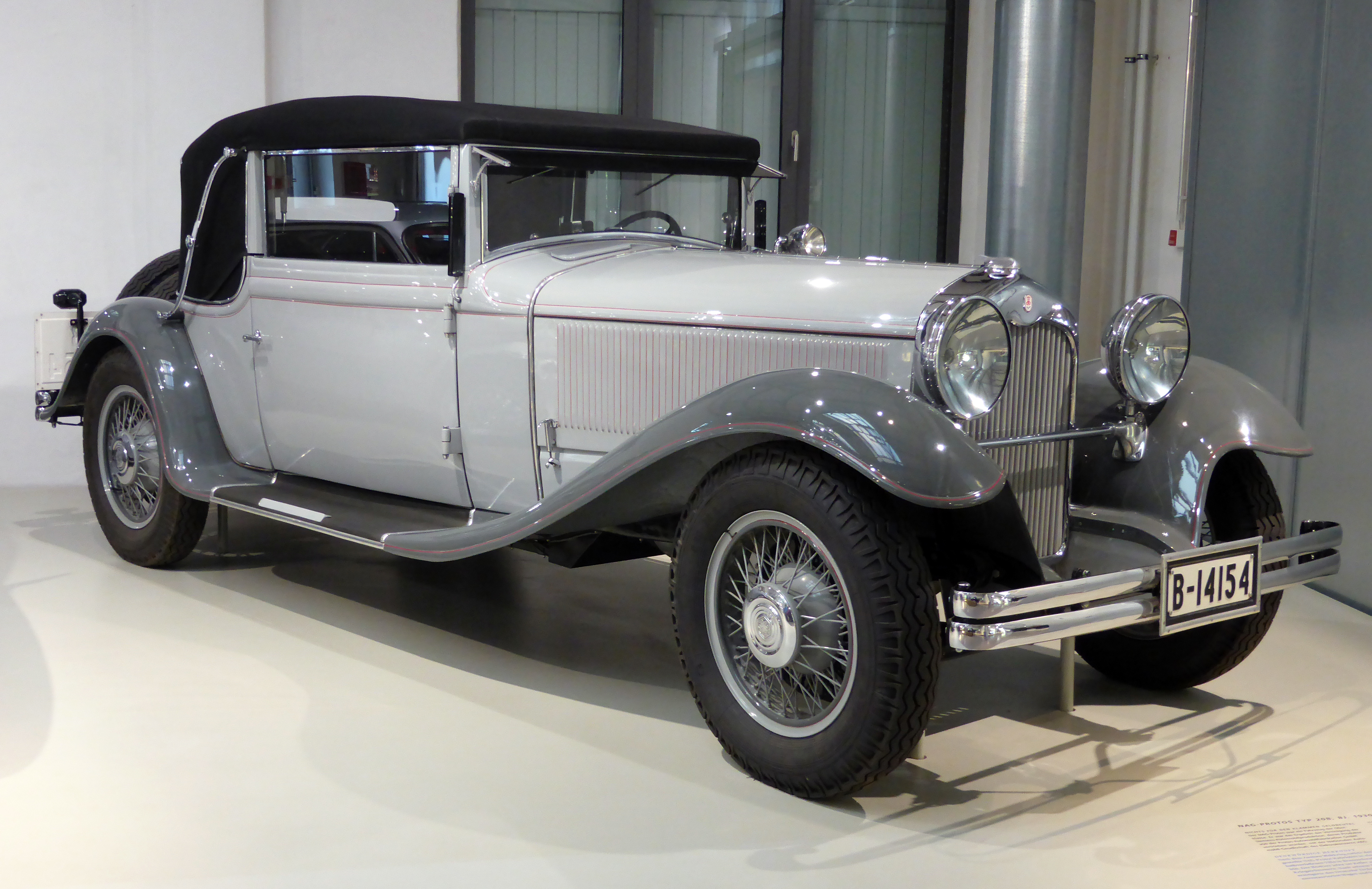 NAG-Protos Sechszylinder Typ 208, Baujahr 1930. Ausgestellt im Deutschen Technikmuseum in Berlin. Wikipedianische KulTour am 10. Oktober 2015 in der Ausstellung des Museums.